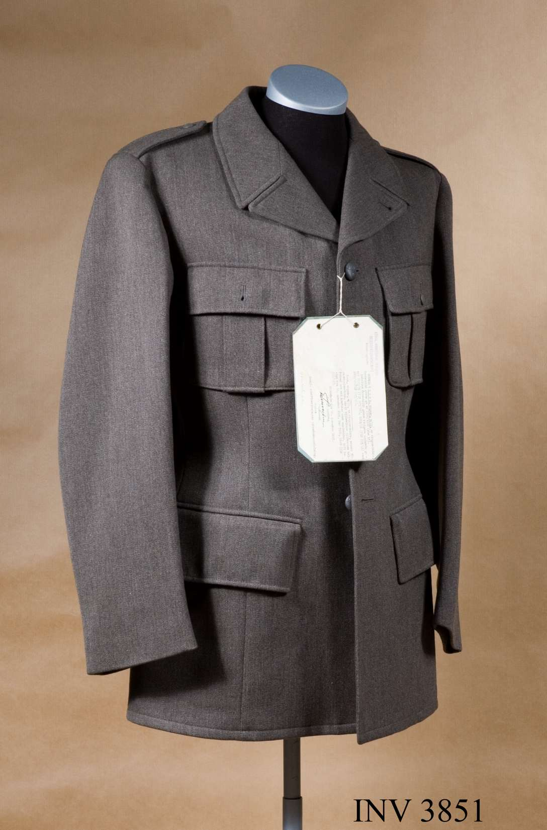 Vapenrock m/1939 Identifikationsnr: AM.003851 Samling: Armémuseum